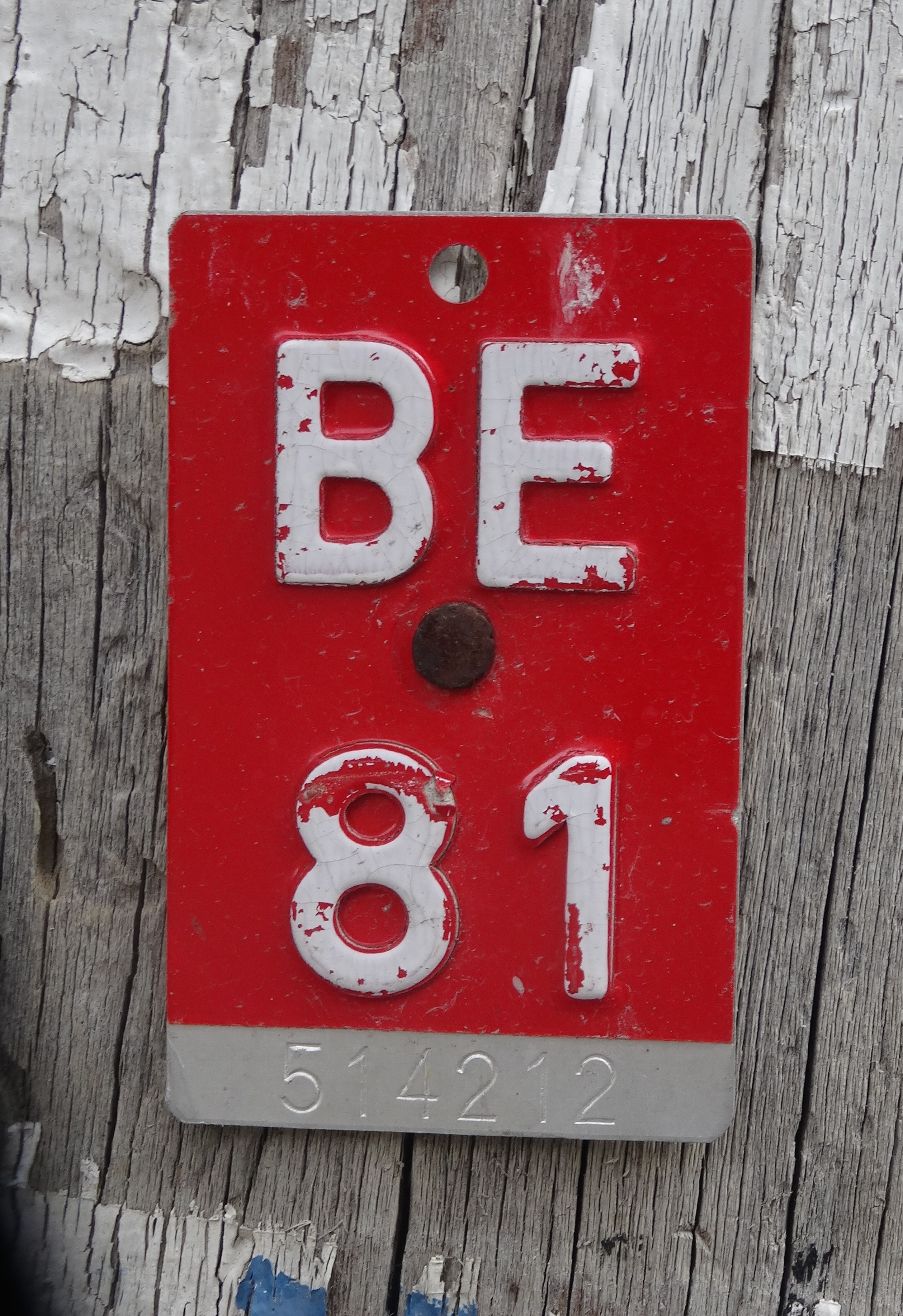 Versicherungsschild („Velovignette“) für Fahrräder im Kanton Bern 1981